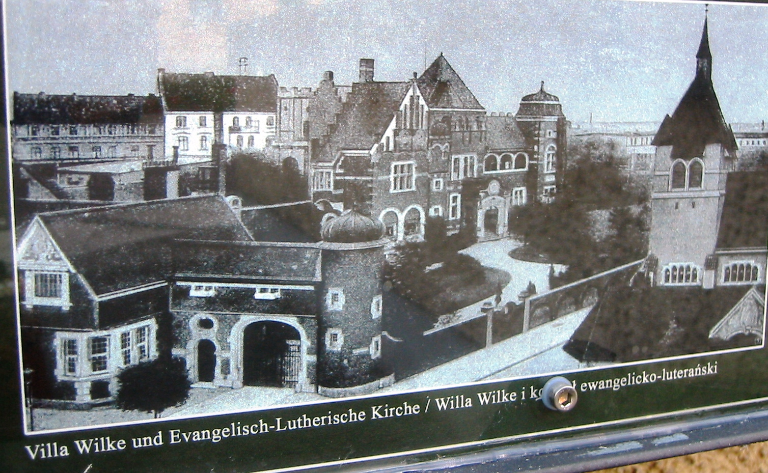 Darstellung der Villa Wilke und der Kirche, aufgenommen auf einer Informationssäule neben der Kirche